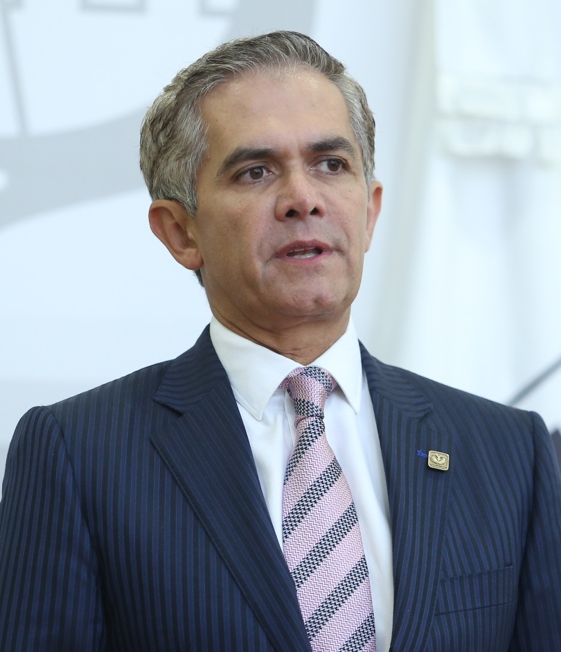 Conferencia de prensa de Miguel Ángel Mancera, del 18 de enero de 2017